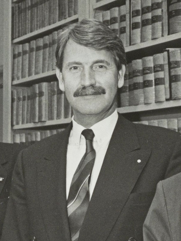 CollectieCollectie Fotoburo de BoerInventarisnummerNL-HlmNHA_54032111NL-HlmNHA_1478_34498kBeschrijvingmr. M.H. KamphuisFotonummerNL-HlmNHA_1478_1863DocumenttypePortrettenVervaardigerBoer, Poppe de Soort vervaardigerFotograaf AnnotatiesHD 100691PersonenPhaff, H.E., Mr.Meysing, mr. J.N.Kamphuis, mr. M.H.Blitz, ir. E.E.C. Functies personenGemeentesecretaris LandNederland ProvincieNoord-Holland GemeenteHaarlem PlaatsHaarlem StraatGrote Markt Begindatum06-1991Einddatum06-1991TechniekFoto TrefwoordenGemeentebestuur